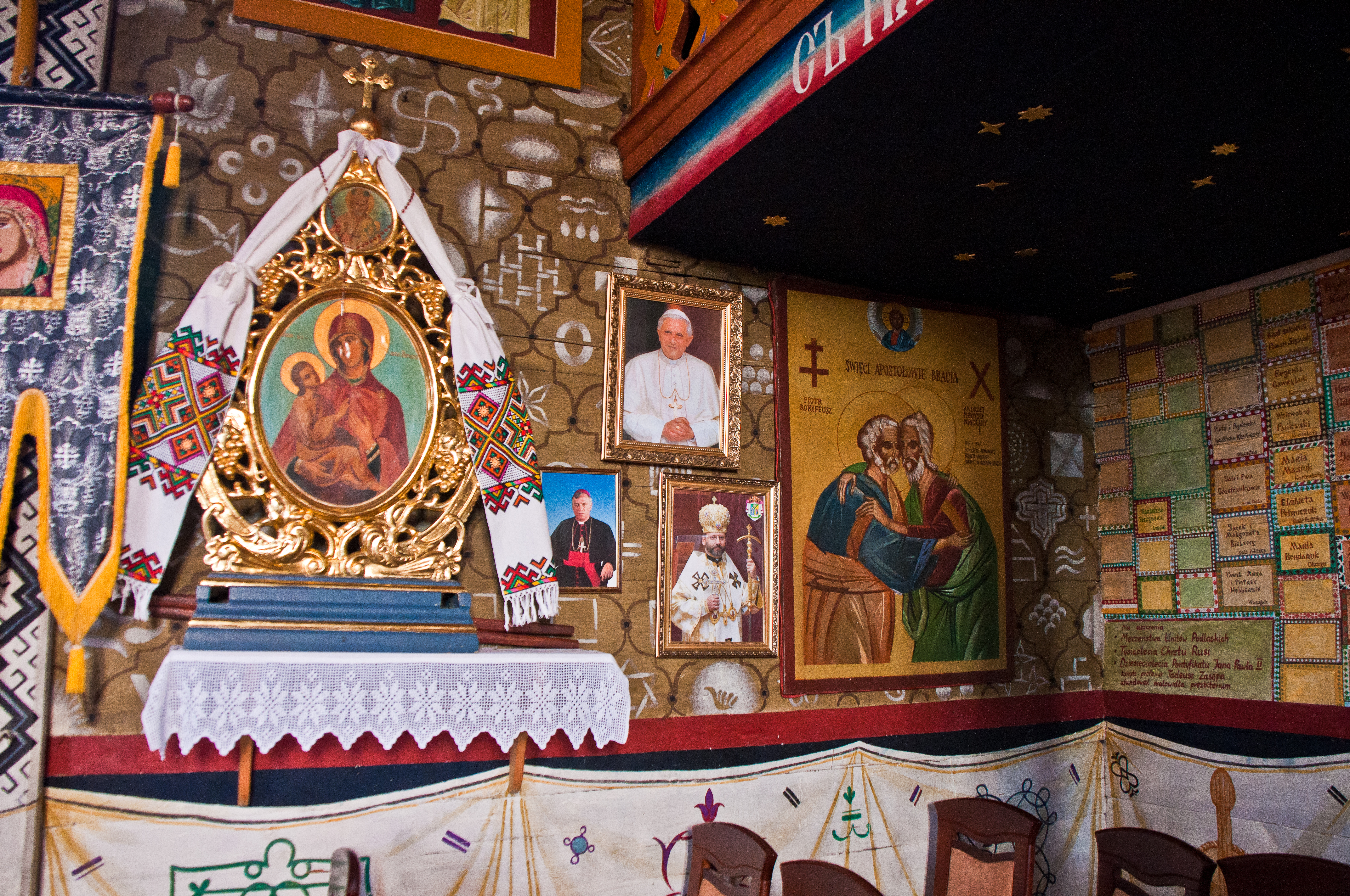 Drewniana greckokatolicka cerkiew Narodzenia Przenajświętszej Bogurodzicy w Chotyńcu. Gmina Radymno, powiat jarosławski.